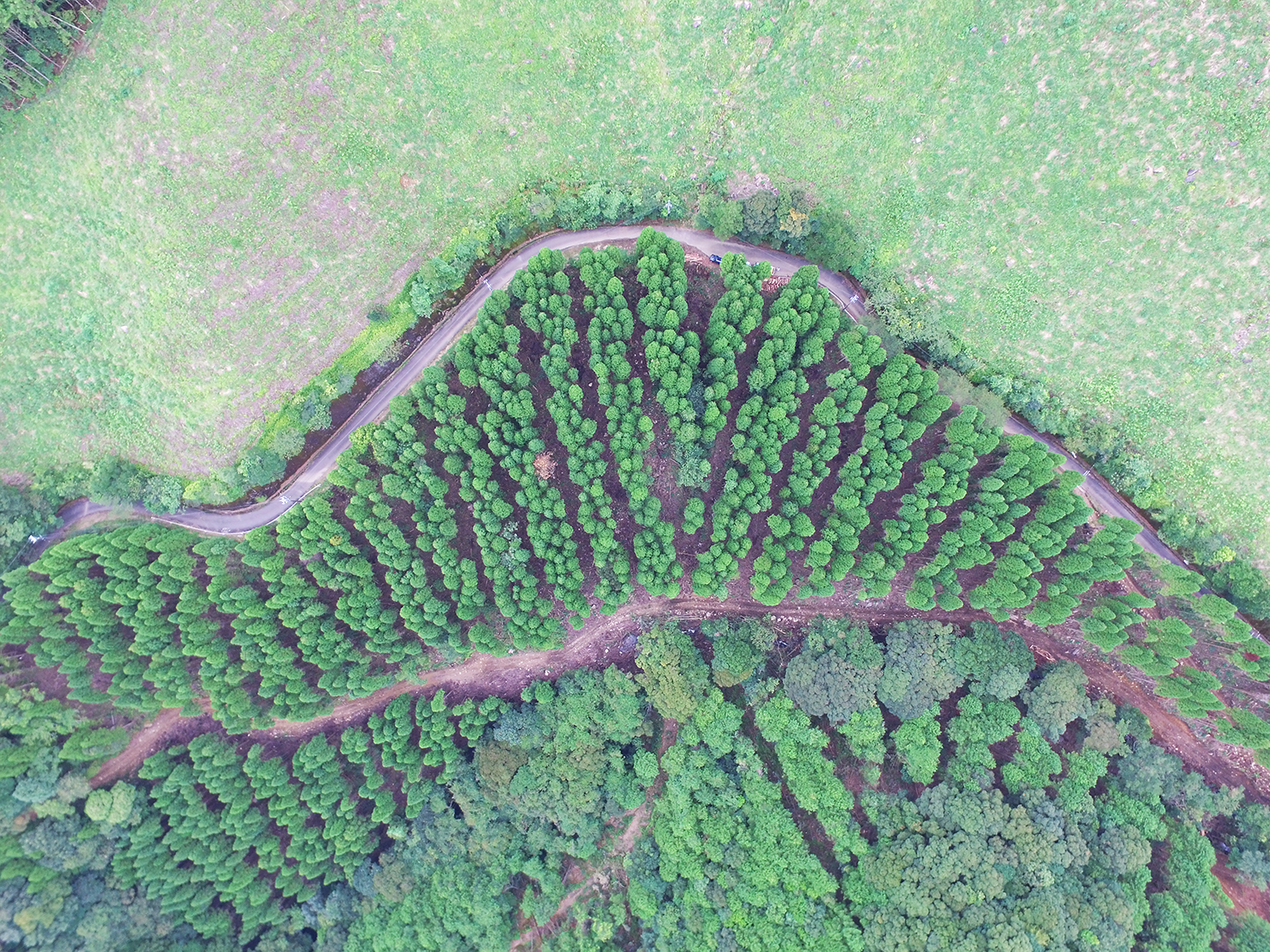 工程の無駄を省くため、作業路上では高性能林業機械の旋回が狭いので、集中的にスイングヤーダにより列間伐を行い、プロセッサとの連携により造材工程のコストを削減した。安全確保の取り組みとして、作業前一人危険予知表を活用し、作業の安全意識を高めた。環境配慮として、大雨、増水時には沢筋等での集材作業、作業路作設を中止した。トラック搬入口付近については、普段より公道の清掃を実施した。担い手の育成として、請負事業体安全大会、労働基準監督署の災害事例説明等を通じて教育を実施した。平成30年度国有林間伐再造林推進コンクール「立木販売部門」の九州森林管理局局長賞を受賞した。 宮崎県日向市音羽山国有林